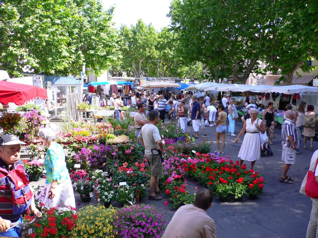 Blick auf den Wochenmarkt in Agde vom Maison des Savoirs aus.